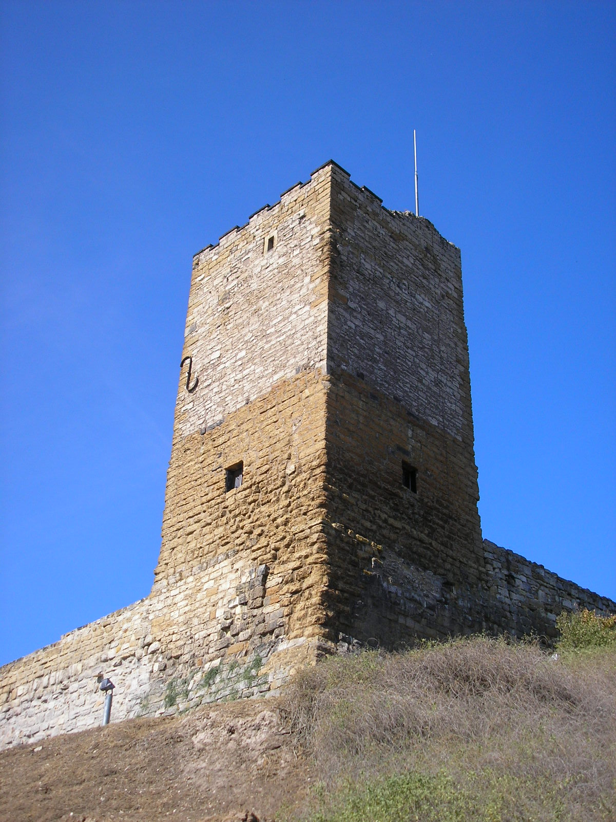 Turm der Burg Gleichen in Thüringen.